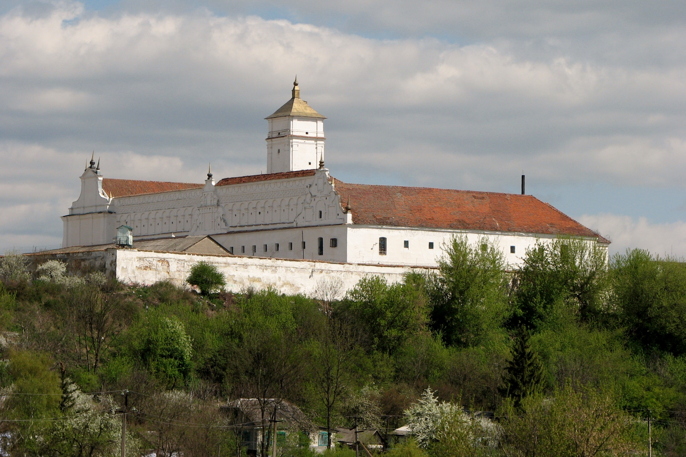 Ізяслав. Бернардинський монастир. Нині тюрма.